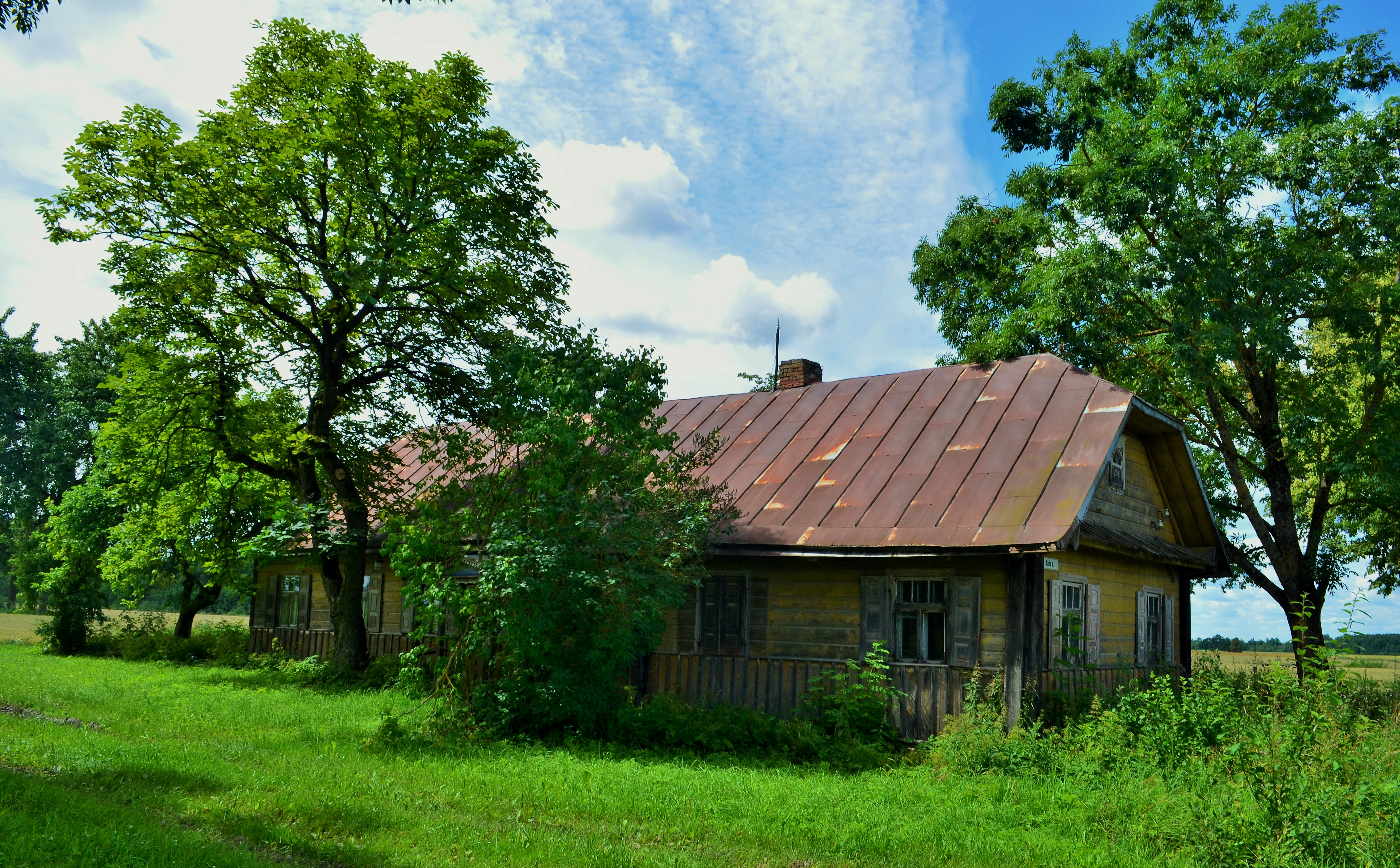 Tradicinės aukštaičių architektūros gryčia, Lažai, Kėdainių raj.